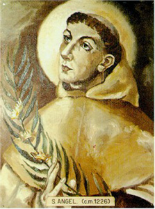 Saint Angelus of Jerusalem